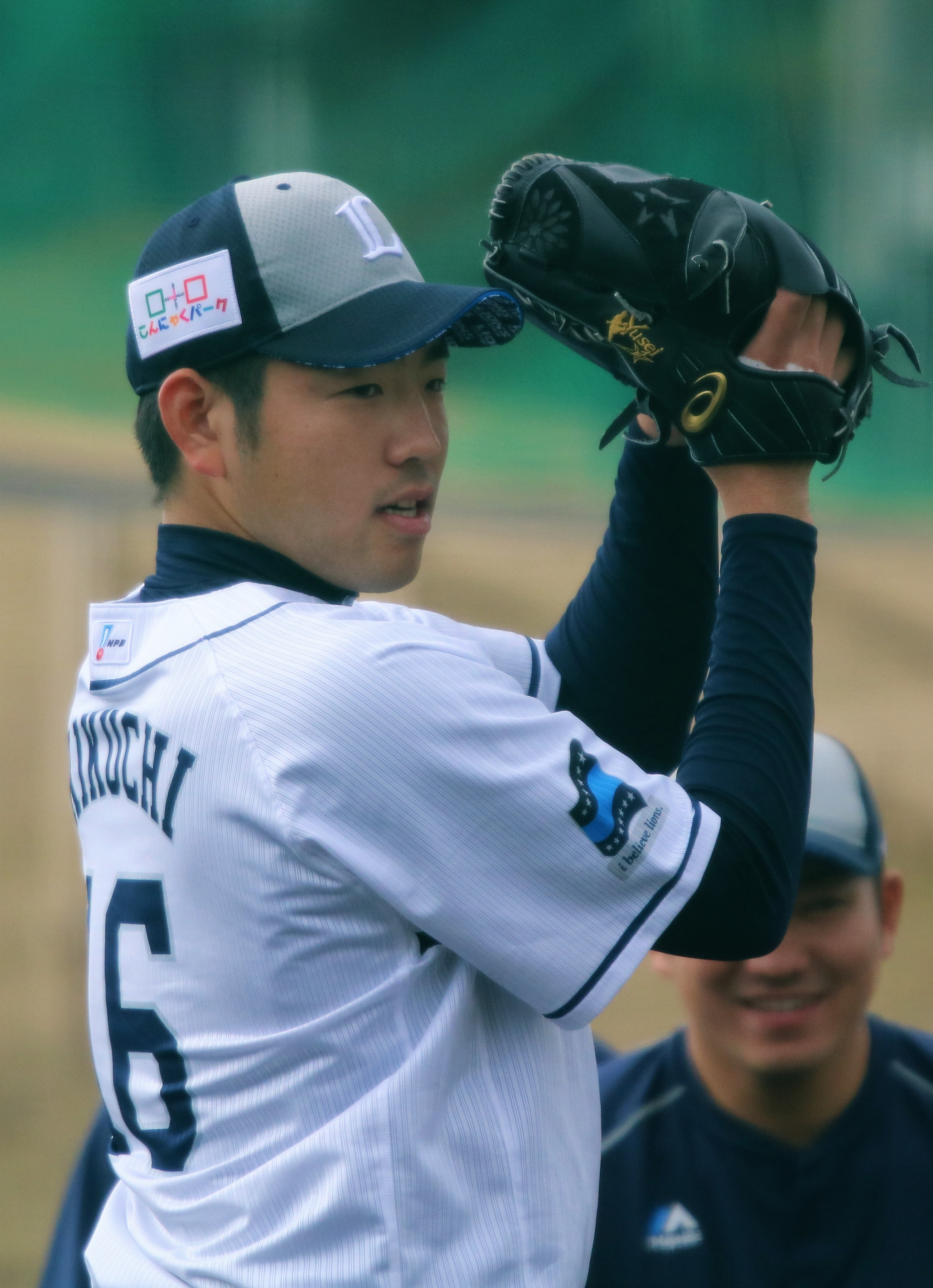 2018年2月9日 春季キャンプ